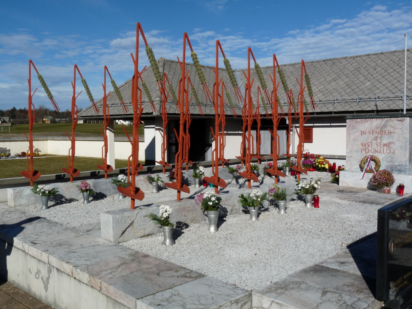 Partizanski spomenik na Dobravi